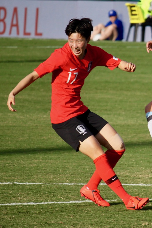 KorArg - SonHwa-yeonAgustinaBarroso